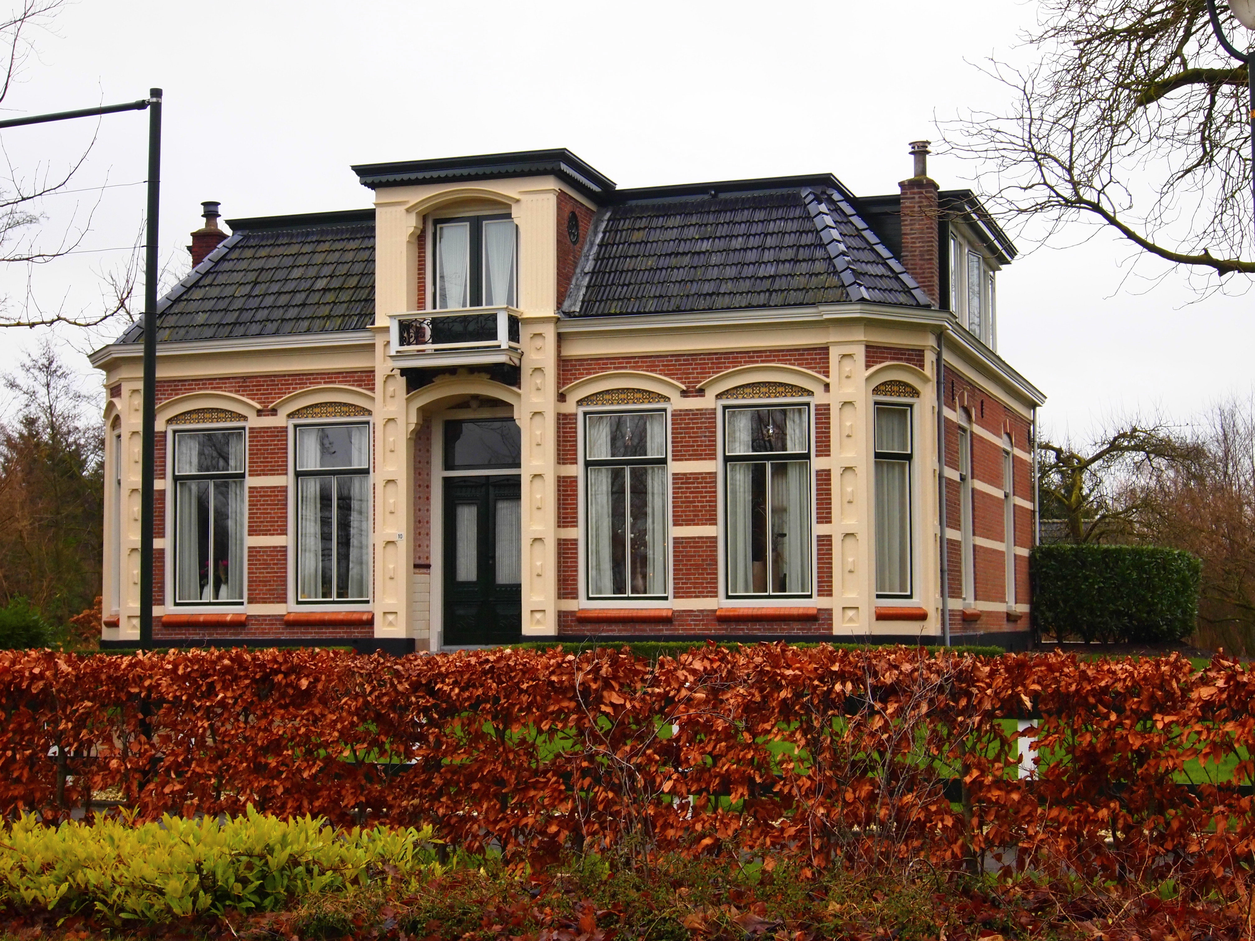 Kommisjewei 10